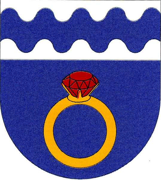 Znak obce Otmarov